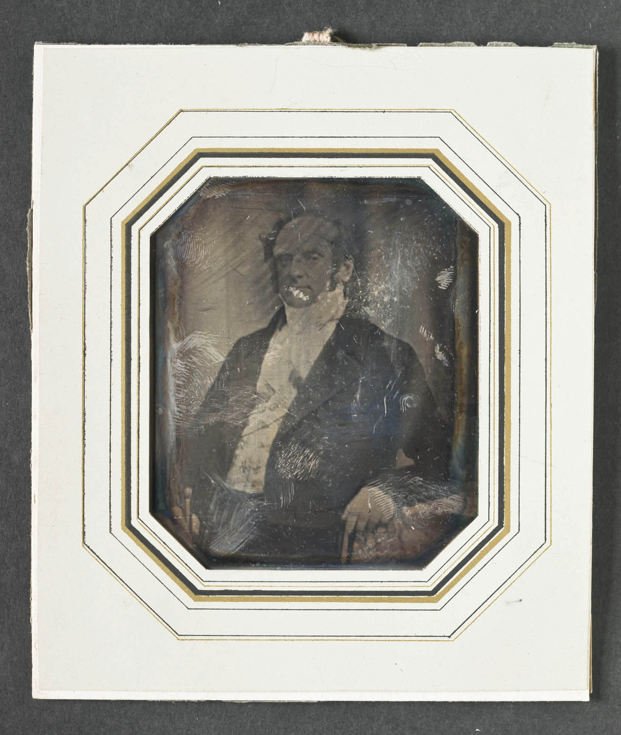 Porträtt av lagman O Oxehufvud (1797-1857) ca 1850. Grå passepartout m linjerat guld/svart, ögla. Troligen utskuren ur ram. H 12 cm B 10 cm. Dagerrotyp / daguerreotyp. NM inv nr 314078.